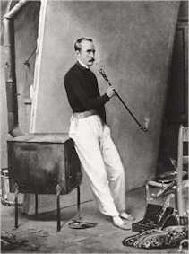 Foto van de in 1856 overleden markies Astolphe de Custine